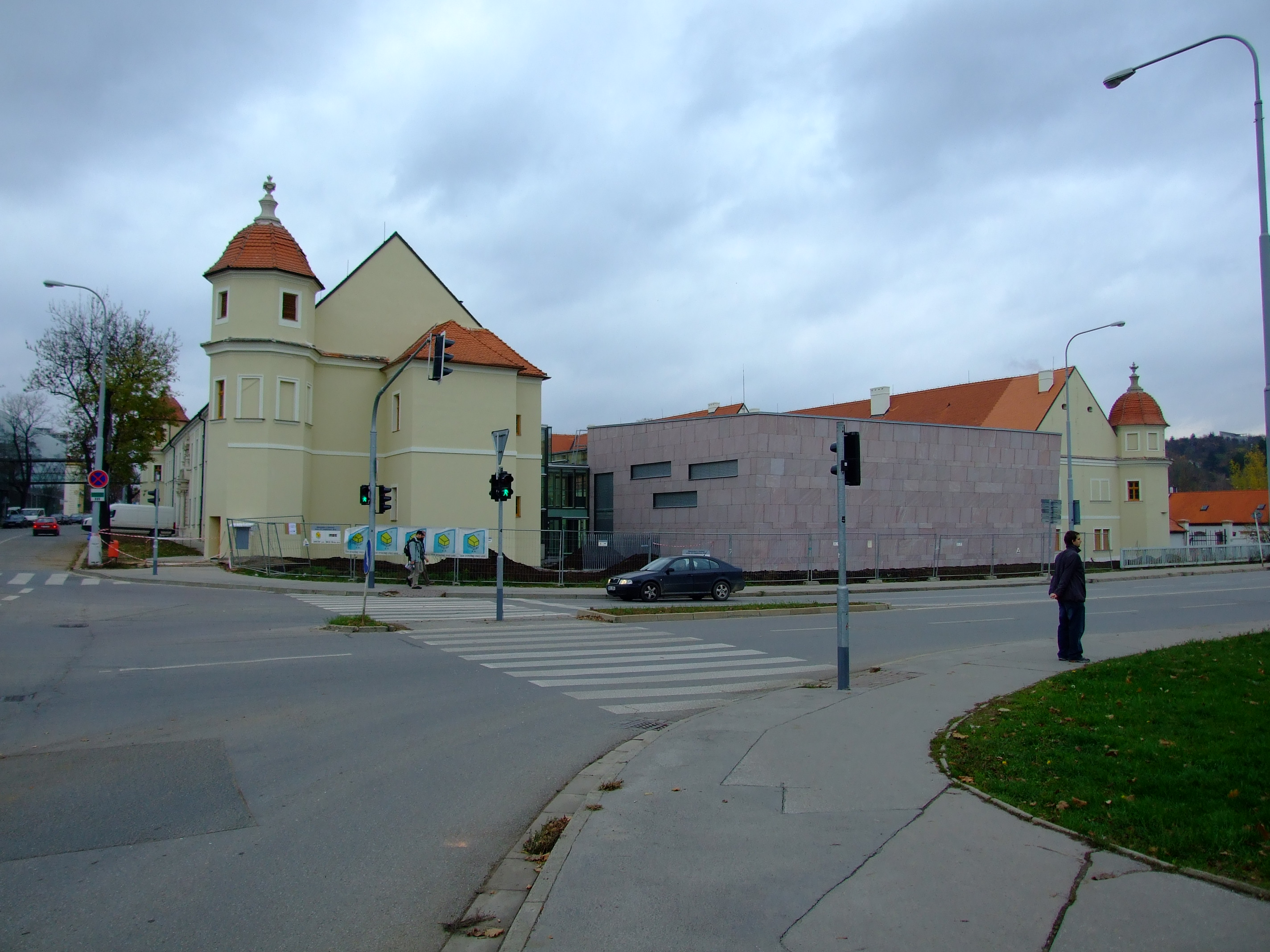 Fakulta informatiky Vysokého učení technického v Brně v Králově poli